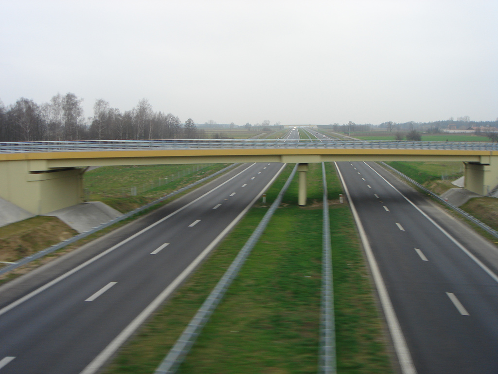 Autostrada A2 niedaleko Strykowa